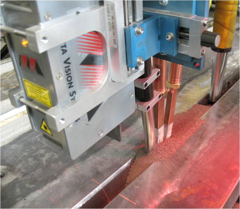 Laserscanner Meta Vision Systems